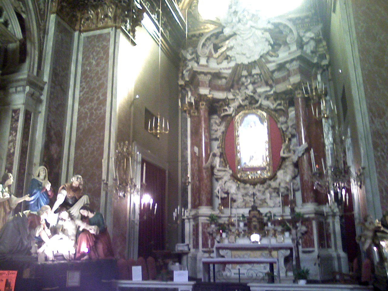 Interno dell'Oratorio del Cristo Risorto di Savona (Italy)